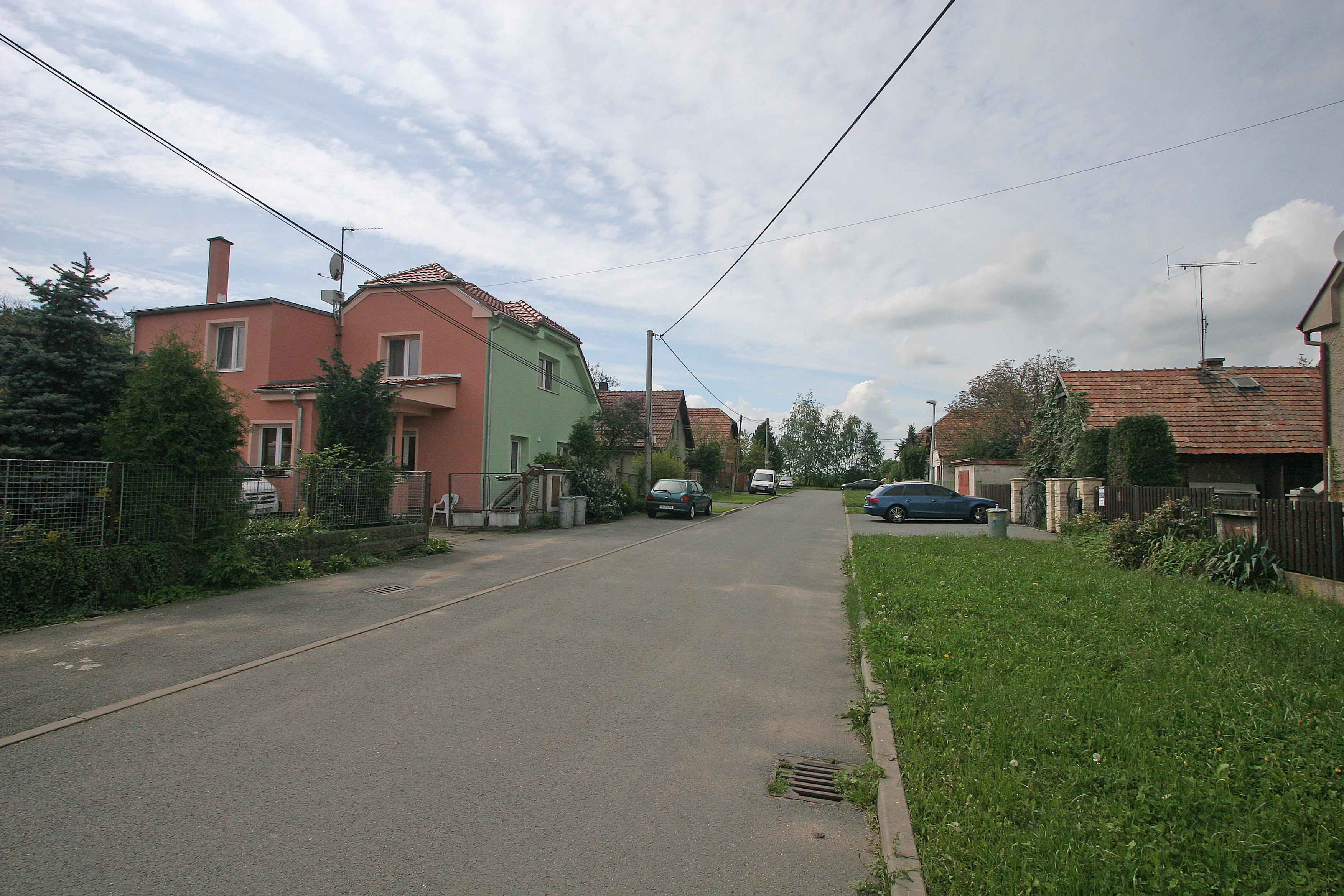 Zachrašťany čp. 113